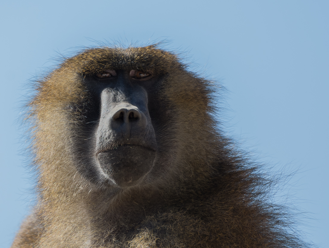 Portrait d'un Babouin de Guiné